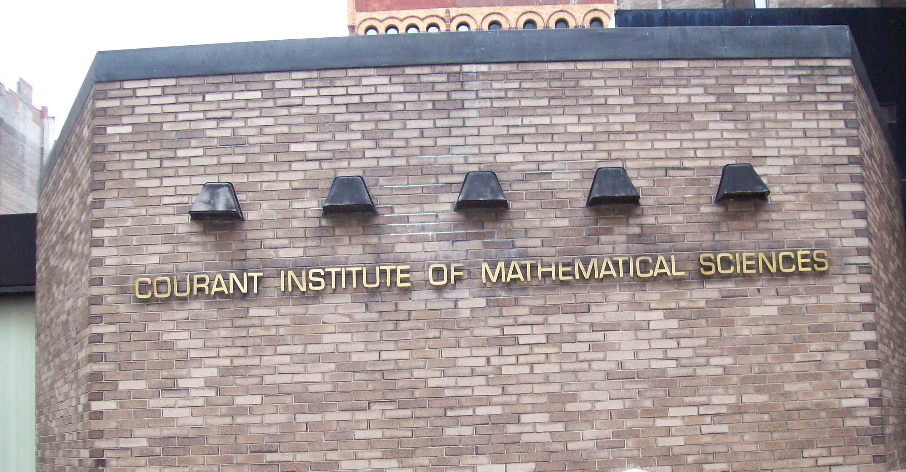 Façana del Courant Institute (New York) aprop de Washington Square